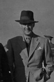 Carlos Rein Segura en una cacería de perdices en España.